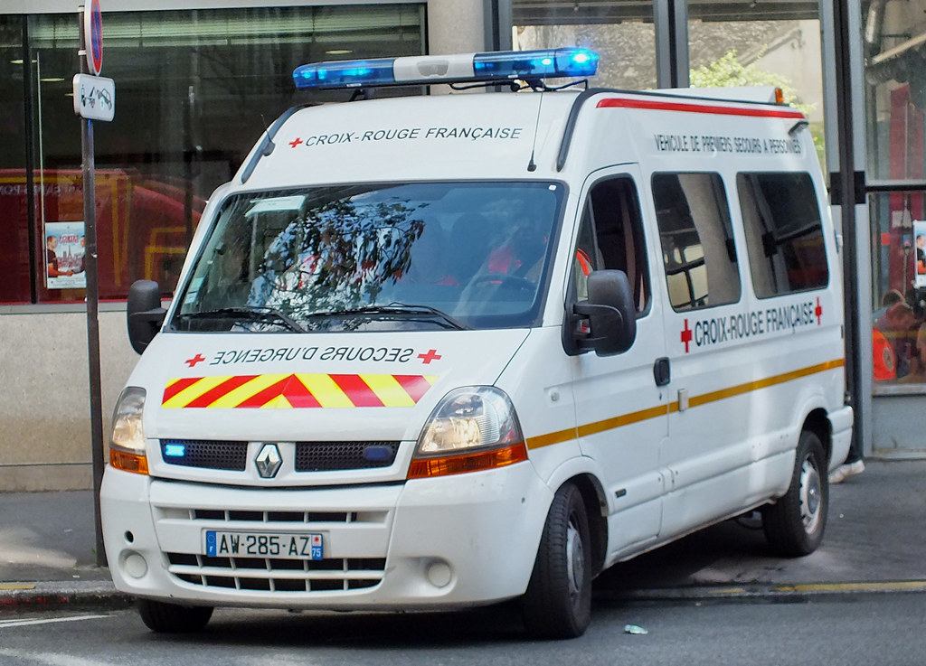 VPSP de la Croix-Rouge française